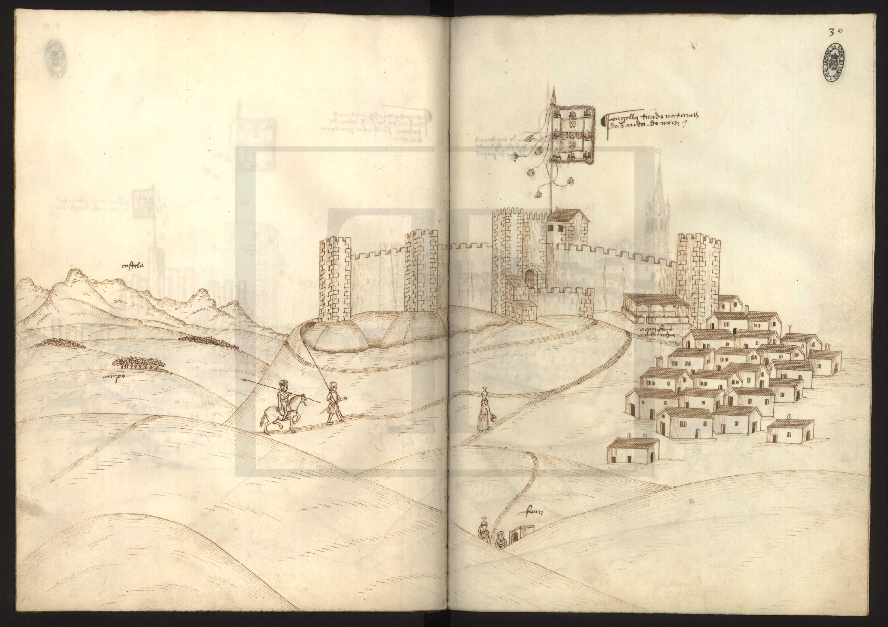 Livro das Fortalezas 30 - Ouguela